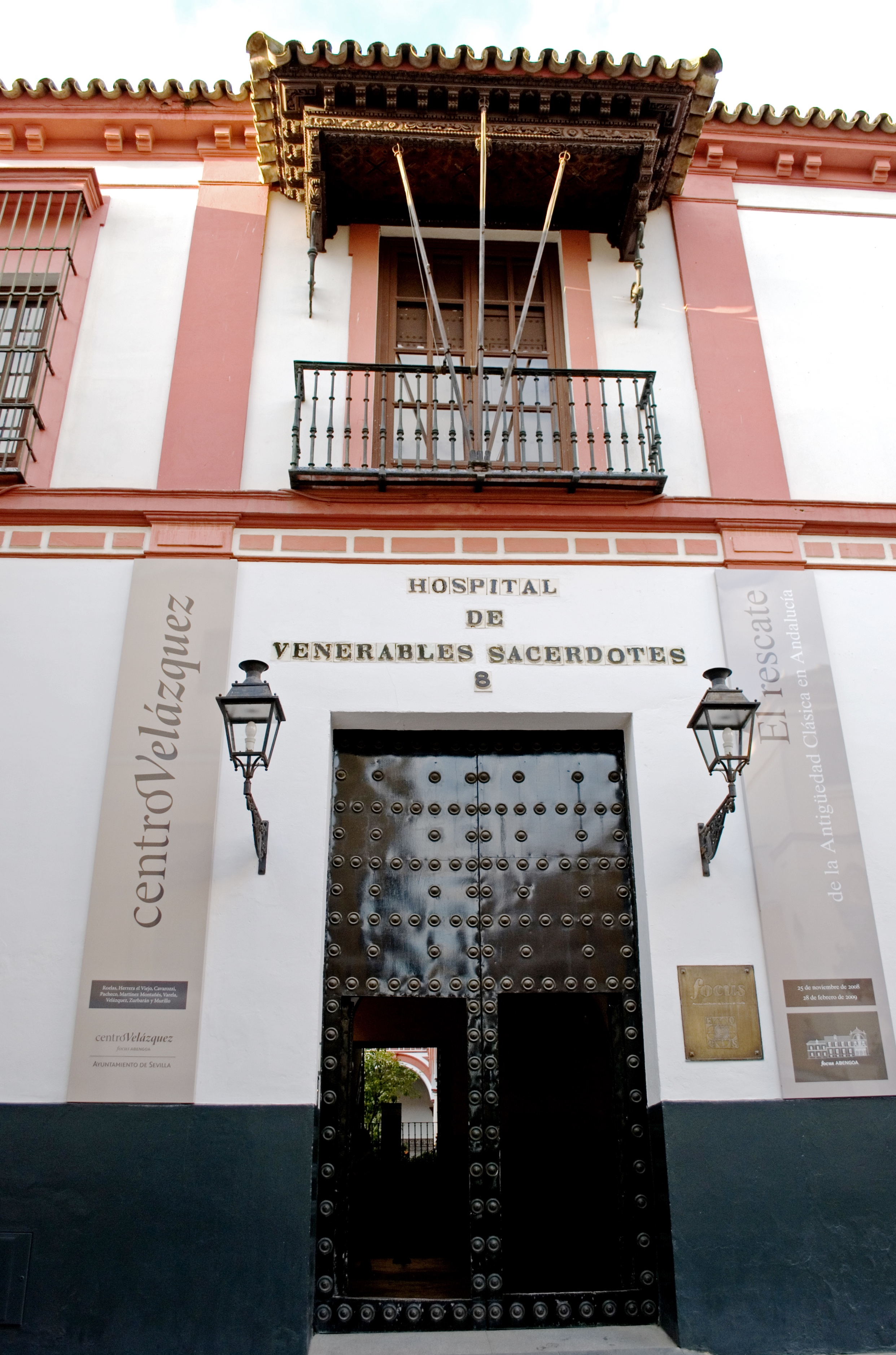 Fachada principal del Hospital de los venerables sacerdotes en Sevilla